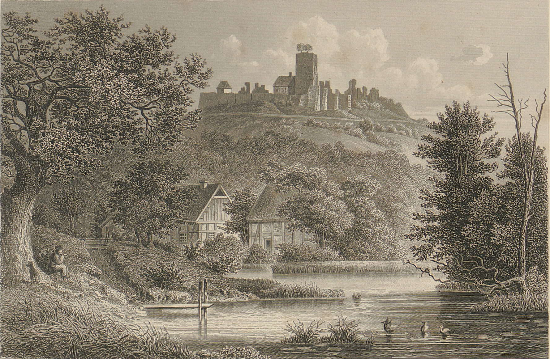 Ravensberg